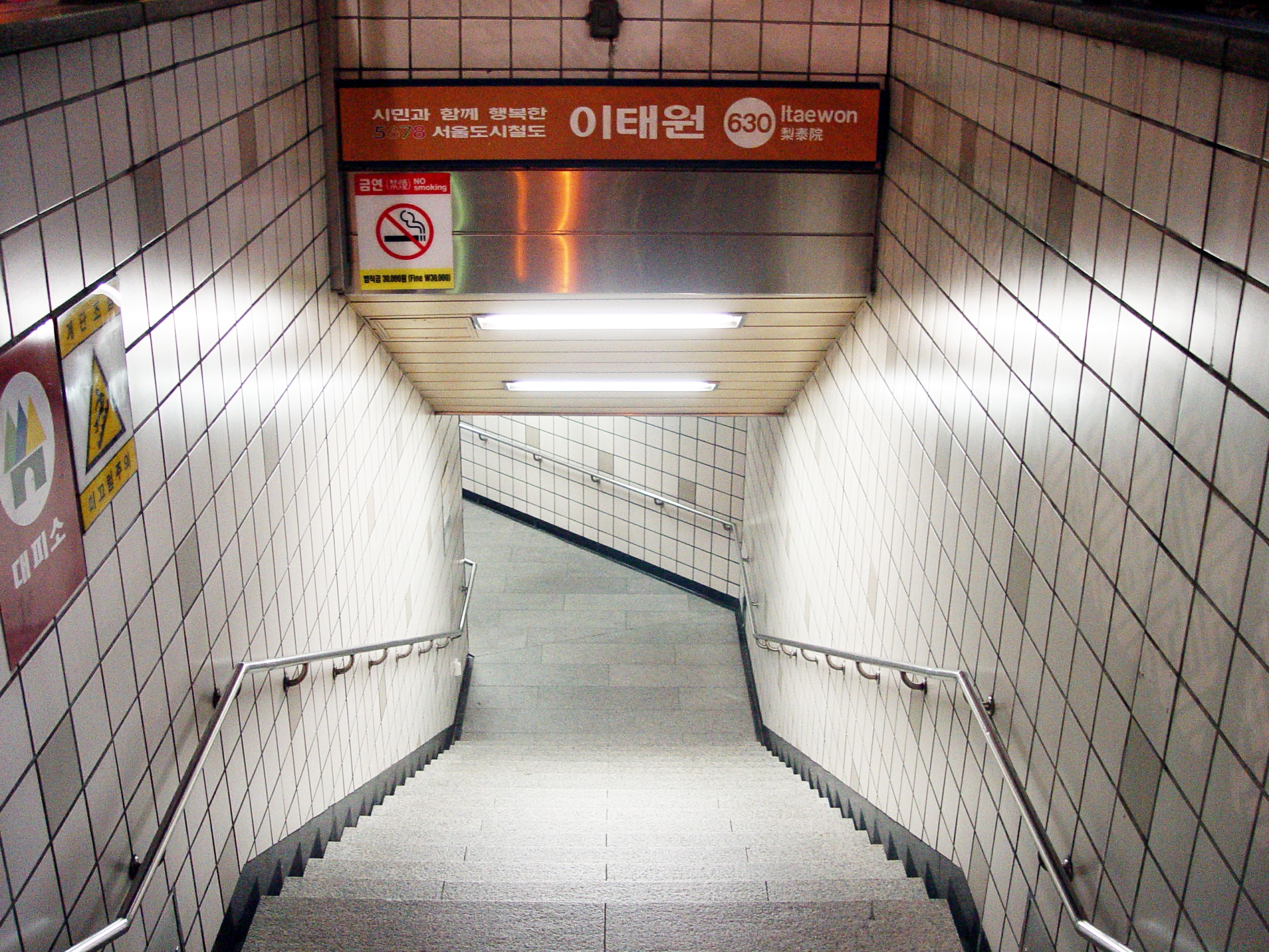 이태원역 2번출구